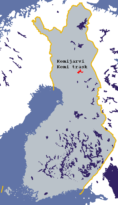 Kemijärven (järvi) sijainti Suomessa * Läget för Kemi träsk i Finland * Location of lake Kemijärvi in Finland